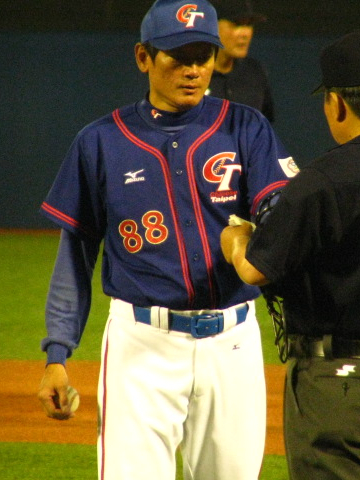 Kuo Tai-yuan